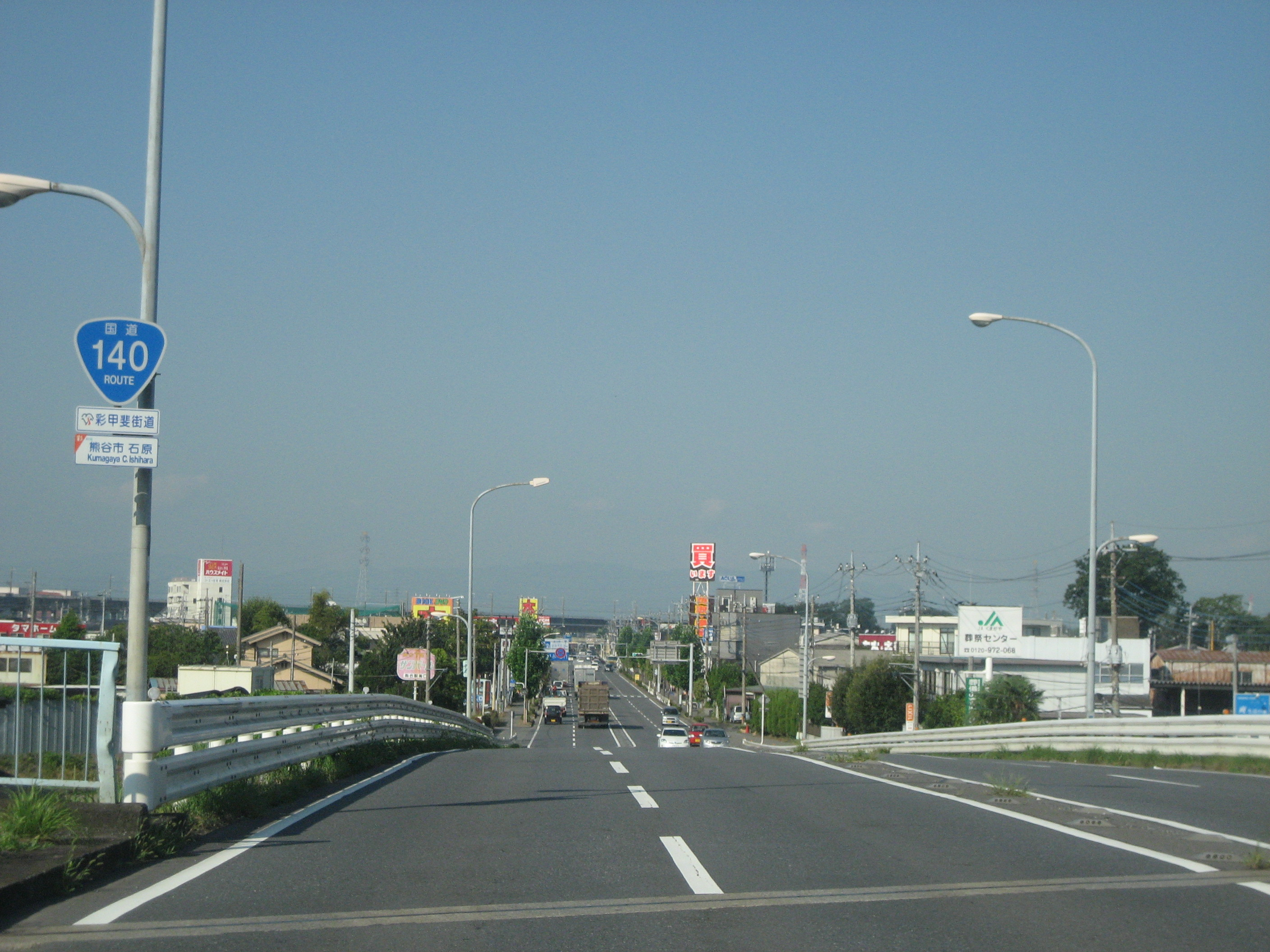 国道140号線埼玉県熊谷市石原付近